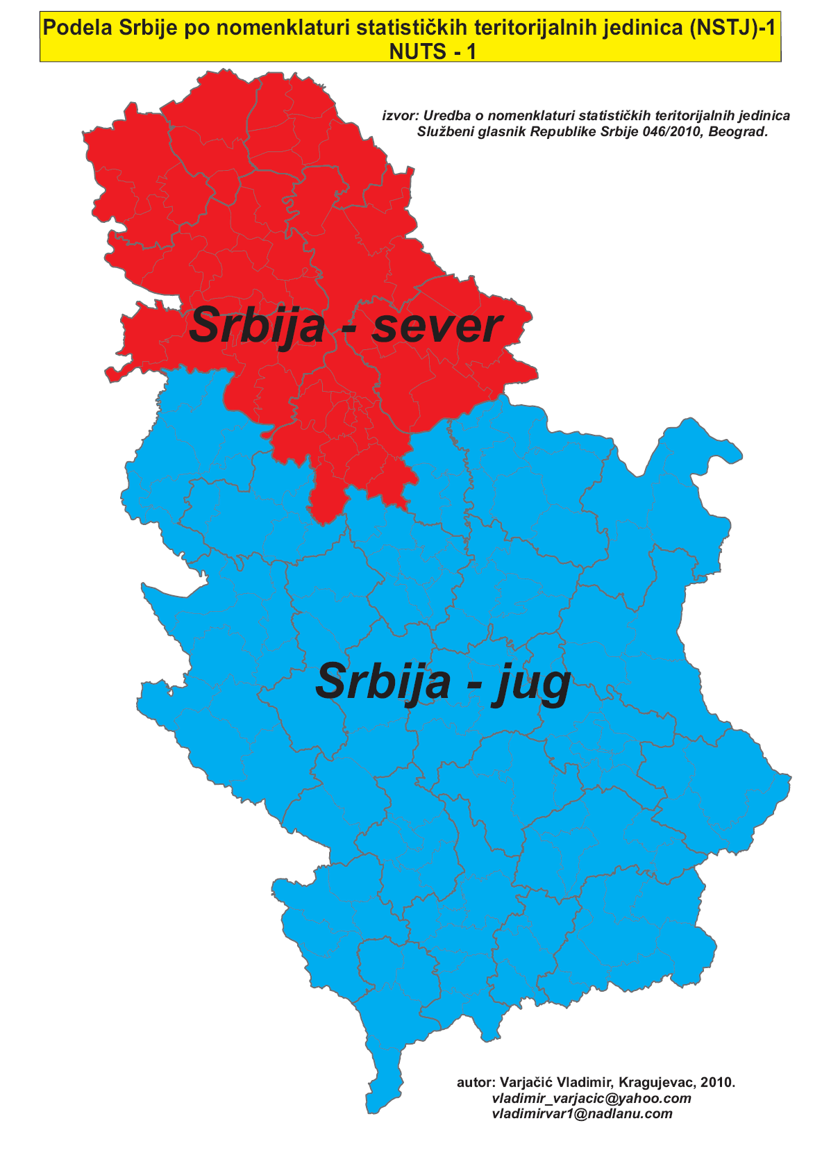 Подела Србије по номенклатури статистичких територијалних јединица